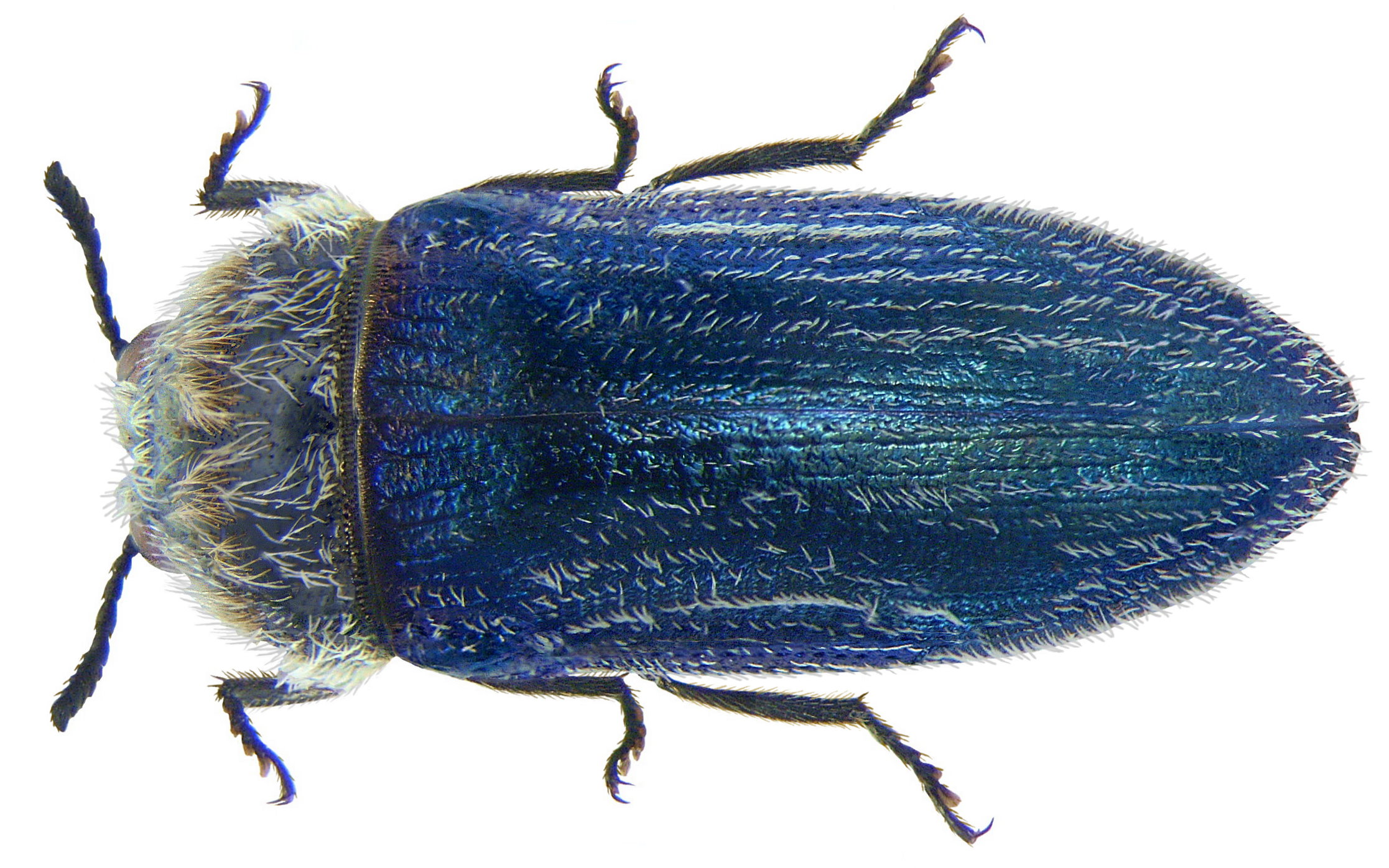 Familie: Buprestidae Grösse: 8,5 mm Fundort: Türkei, Prov. Mersin, Mersin leg. A.Skale, 2002; det. M.Niehuis, 2002 Foto: U.Schmidt, 2009